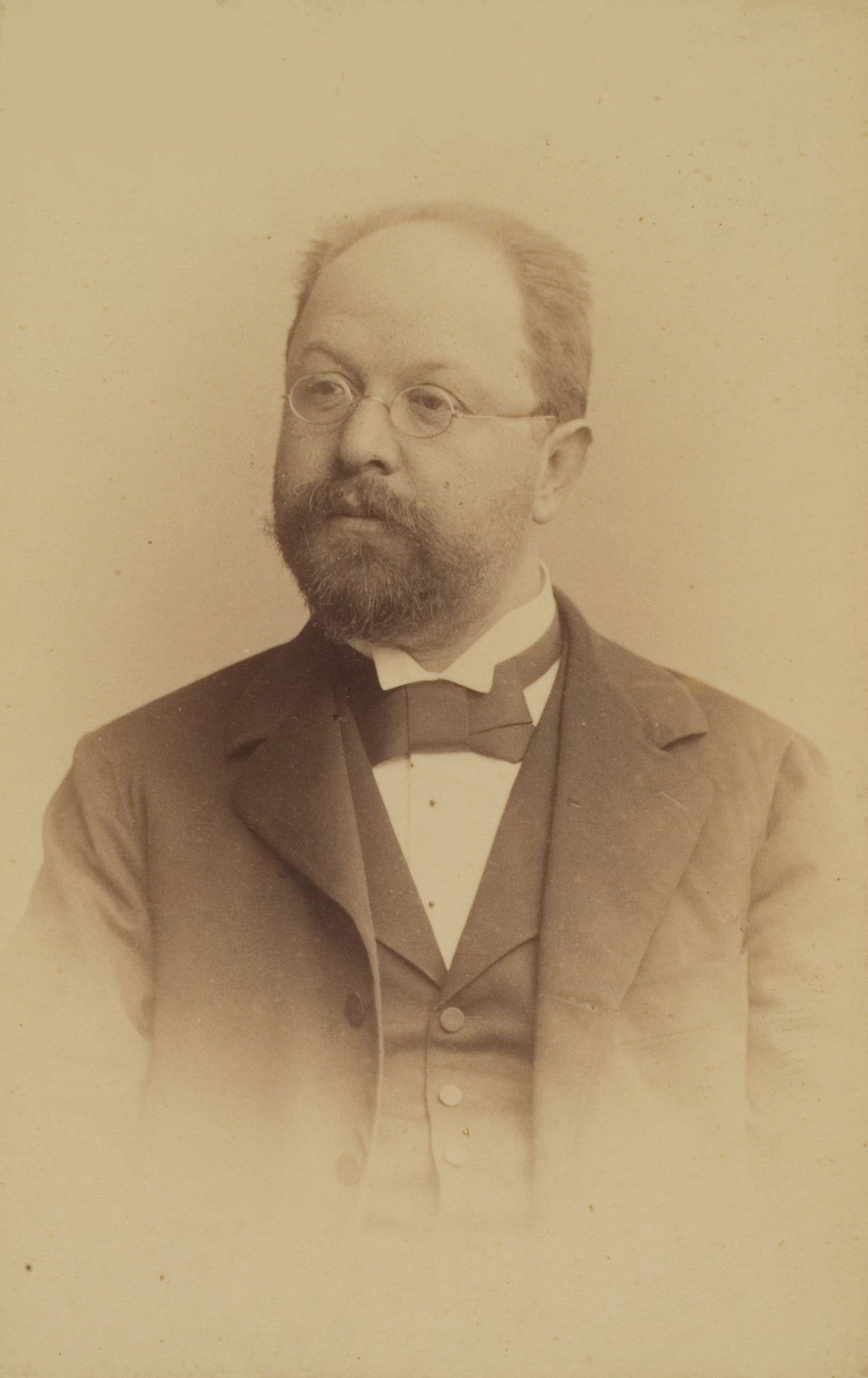 Georg Jellinek, Jurist, 1890–1911 Professor in Heidelberg